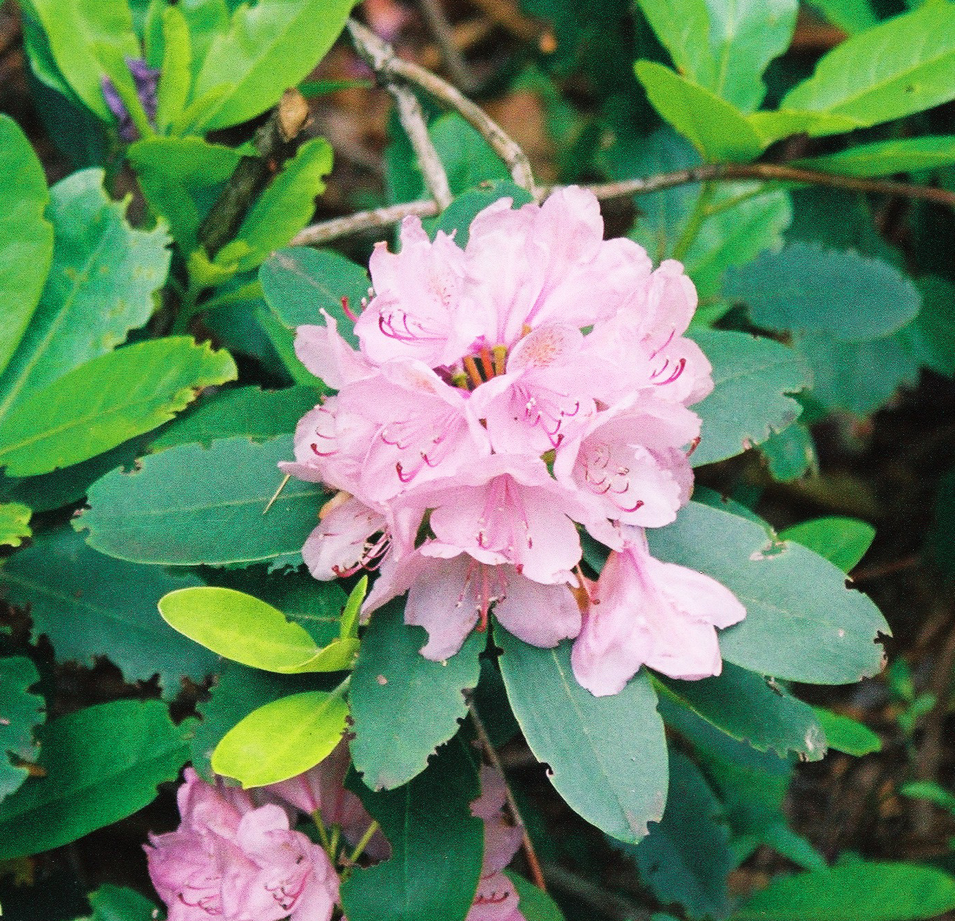 Różanecznik_katawbijski